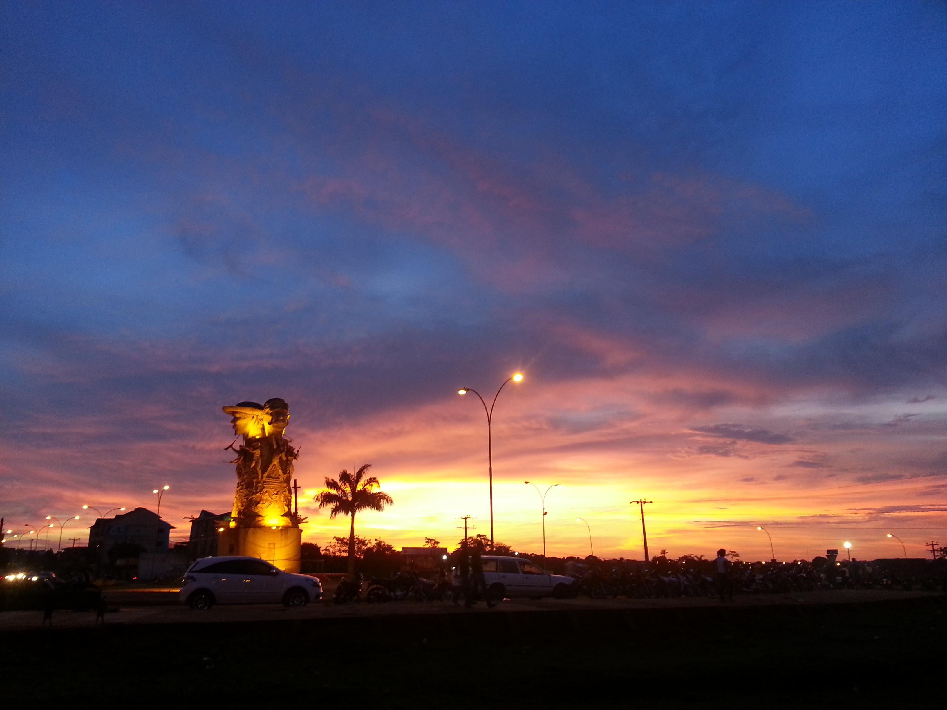 Homenaje a tres personas, a Nicolas Suarez, Jose Manuel Pando y a Bruno Racua defensores del territorio boliviano durante la Guerra del Acre del Acre, Conocido también como el monumento a los héroes de la Batalla de Bahía. Sobre la Avenida 9 de Febrero cerca al monumento del Carretón.